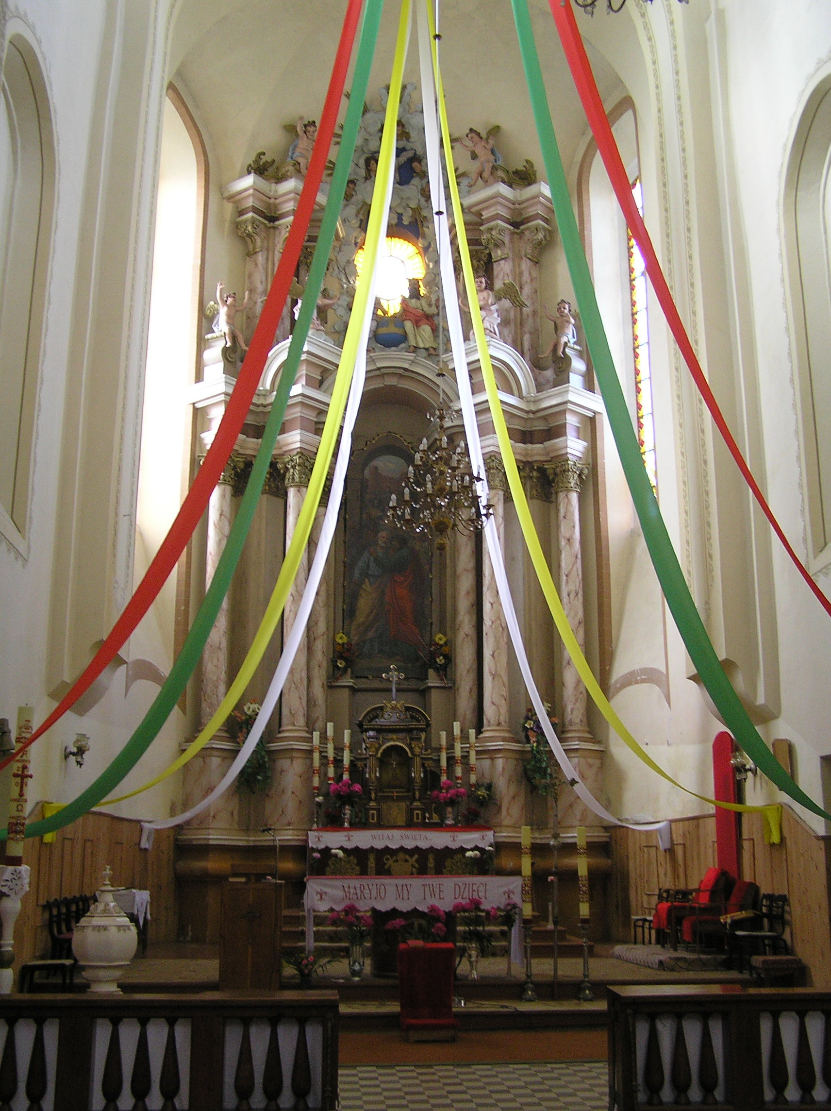 Беларуская (тарашкевіца): Ансамбль былога манастыра базылян: Петрапаўлаўская царква са званіцай, агароджай і брамамі дэкаратыўнае аздабленьне інтэр’ера царквы: тры алтары, амбон жылы корпус капліца. в. Баруны This is a photo of Belarusian heritage monument. Reference number: 412Г000062 ( WLM)